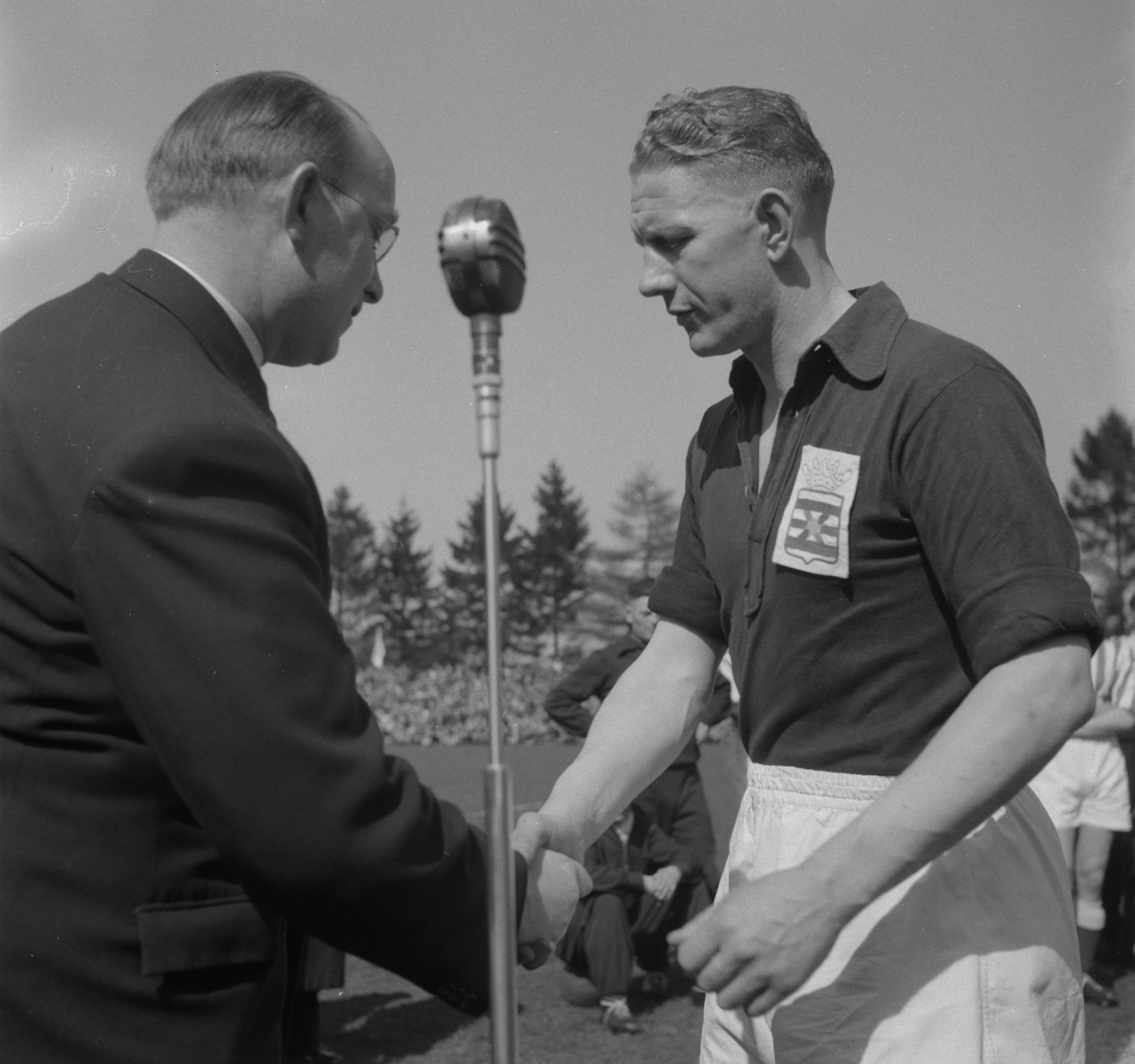 Collectie / Archief : Fotocollectie Anefo Reportage / Serie : [ onbekend ] Beschrijving : Enschede tegen Wageningen afscheid Mohring en W. ter Duis Datum : 22 april 1951 Trefwoorden : sport, voetbal Persoonsnaam : W. ter Duis Fotograaf : Noske, J.D. / Anefo Auteursrechthebbende : Nationaal Archief Materiaalsoort : Negatief (zwart/wit) Nummer archiefinventaris : bekijk toegang 2.24.01.03 Bestanddeelnummer : 904-5316